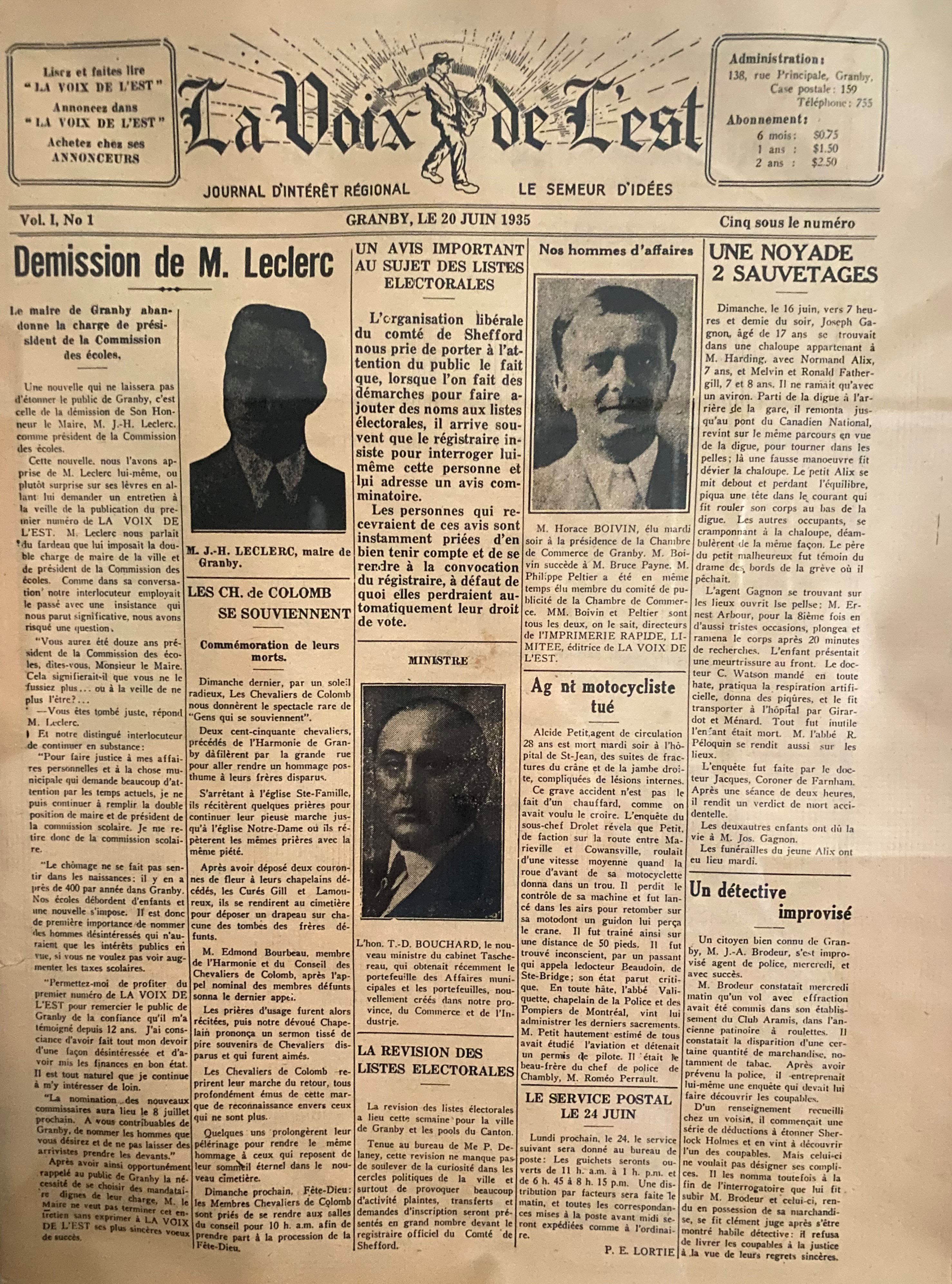 Photo d'une copie de la première édition de La Voix de l'Est, publiée le 20juin 1935.